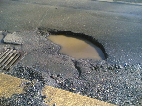 Wassergefülltes Schlagloch am Straßenrand